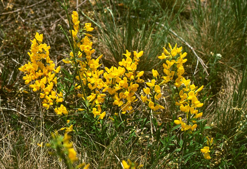 Liege-Geißklee (Cytisus procumbens), Hülsenfrüchtler (Fabaceae), Schmetterlingsblütler (Faboideae) - Österreich/Austria/Autriche: Niederösterreich, Ostrand des Waldviertels, „Kogelstein“ NNE Grafenberg bei Eggenburg